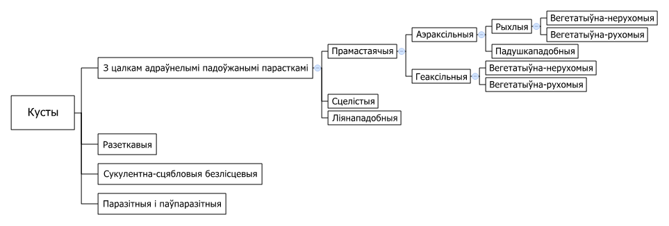 Схема класіфікацыі жыццёвых формаў кустоў паводле І. Р. Серабракова